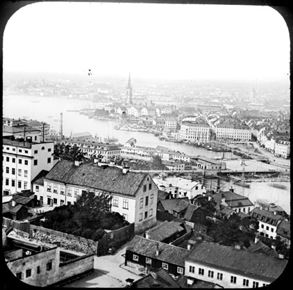 Vy över norra Södermalm (Fiskargatan närnast i bild) och Gamla stan med Riddarholmen. Fotografi av Eugène Trutat från ca 1860-talet. Möjligen taget från Katarina kyrkas torn.